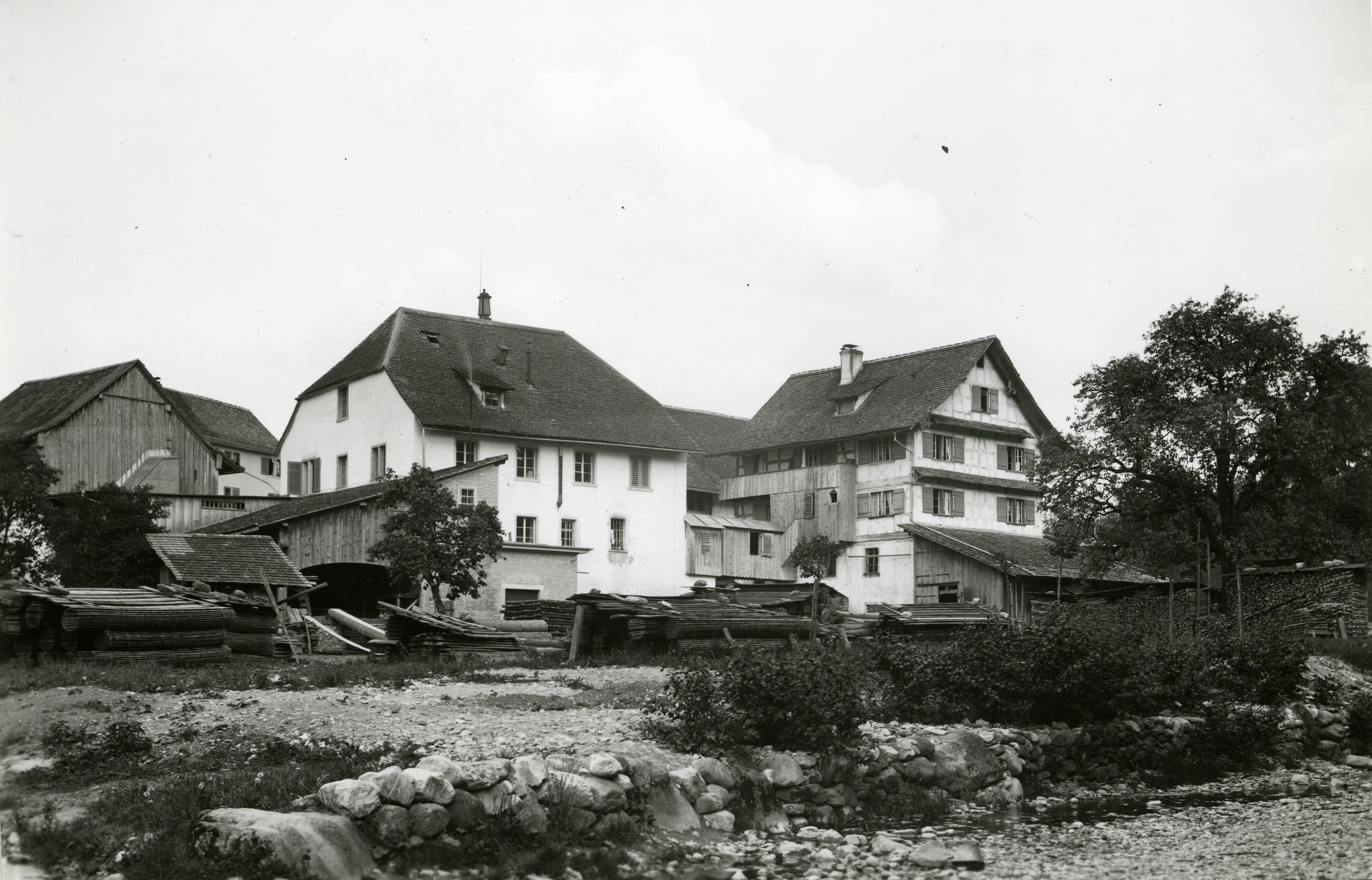 Mühle Hirslanden, Zürich, Schweiz, 1895